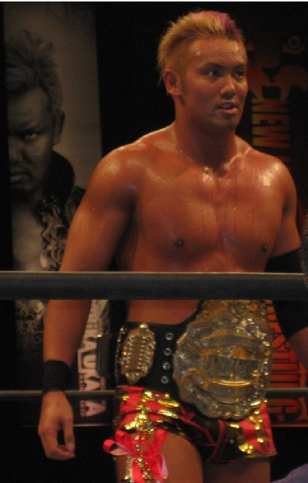 新日本プロレス 大阪大会 オカダ・カズチカ選手